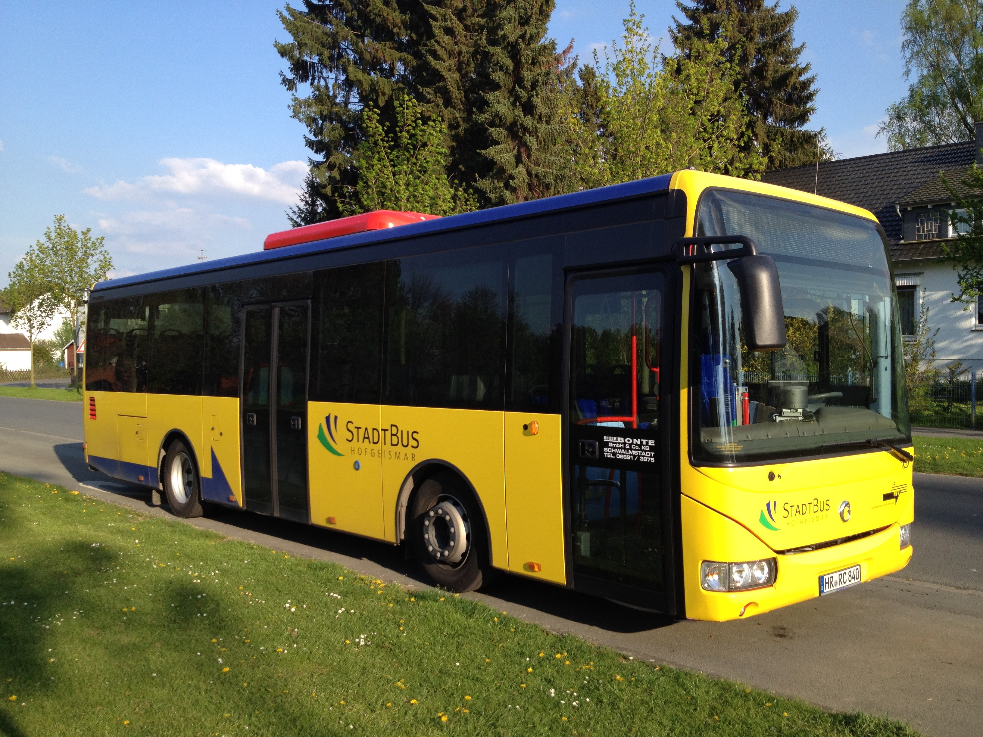 Ein Stadtbus von Hofgeismar (Reisedienst Bonte) in der Straße Am Anger nahe dem ZOB